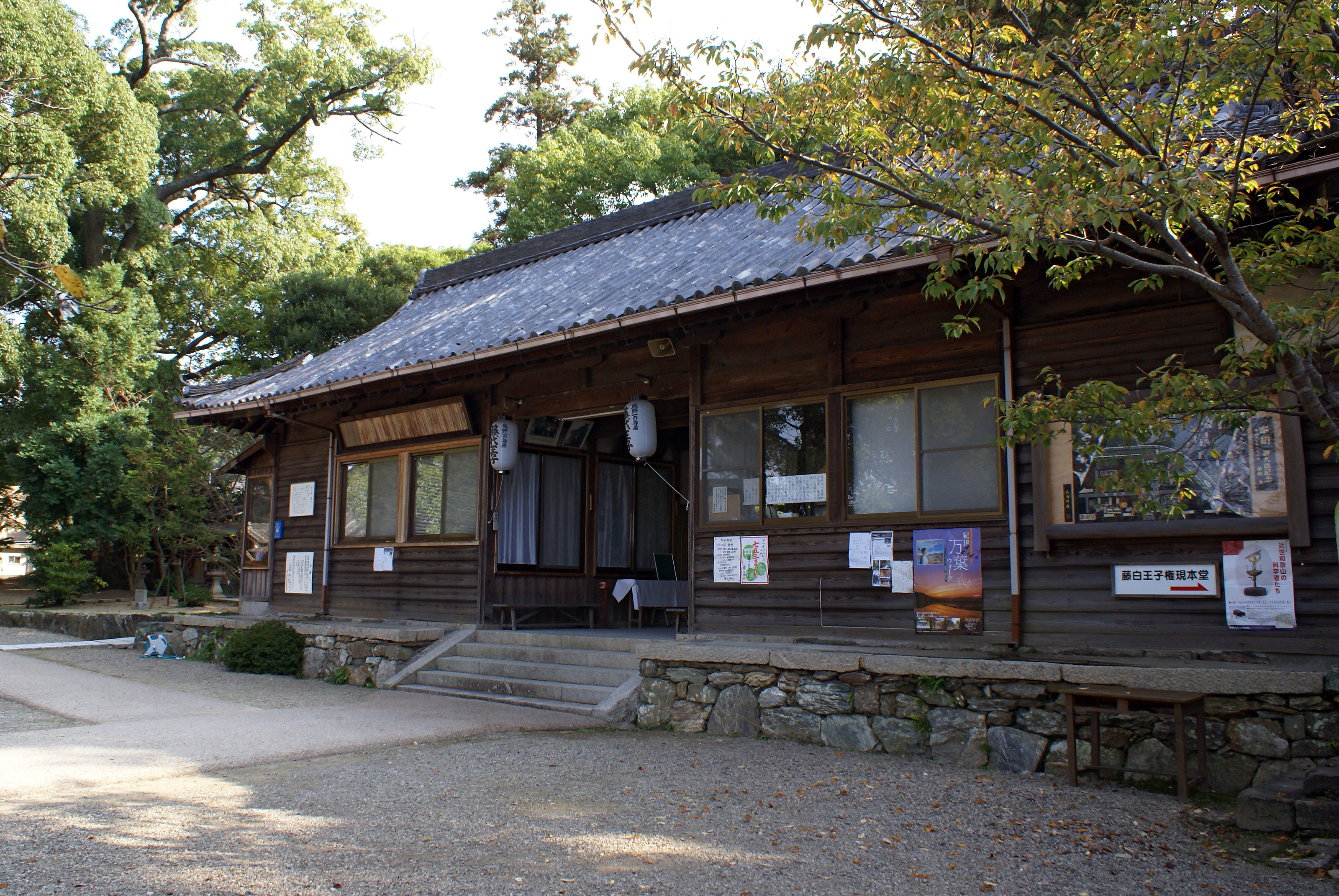 Fujishiro-jinja in Kainan, Wakayama, Japan